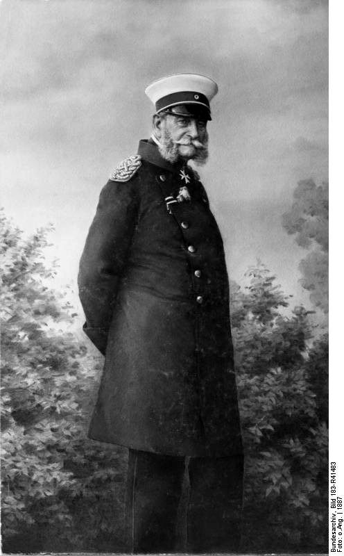 Kaiser Wilhelm I. Kaiser Wilhelm I. im 90.zigsten Lebensjahr 26771-32 [Kaiser Wilhelm I. in Uniform mit Prinz-Heinrich-Mütze] Abgebildete Personen: Wilhelm I.: Deutsches Reich, Kaiser, I., Deutschland (PND 118632884)